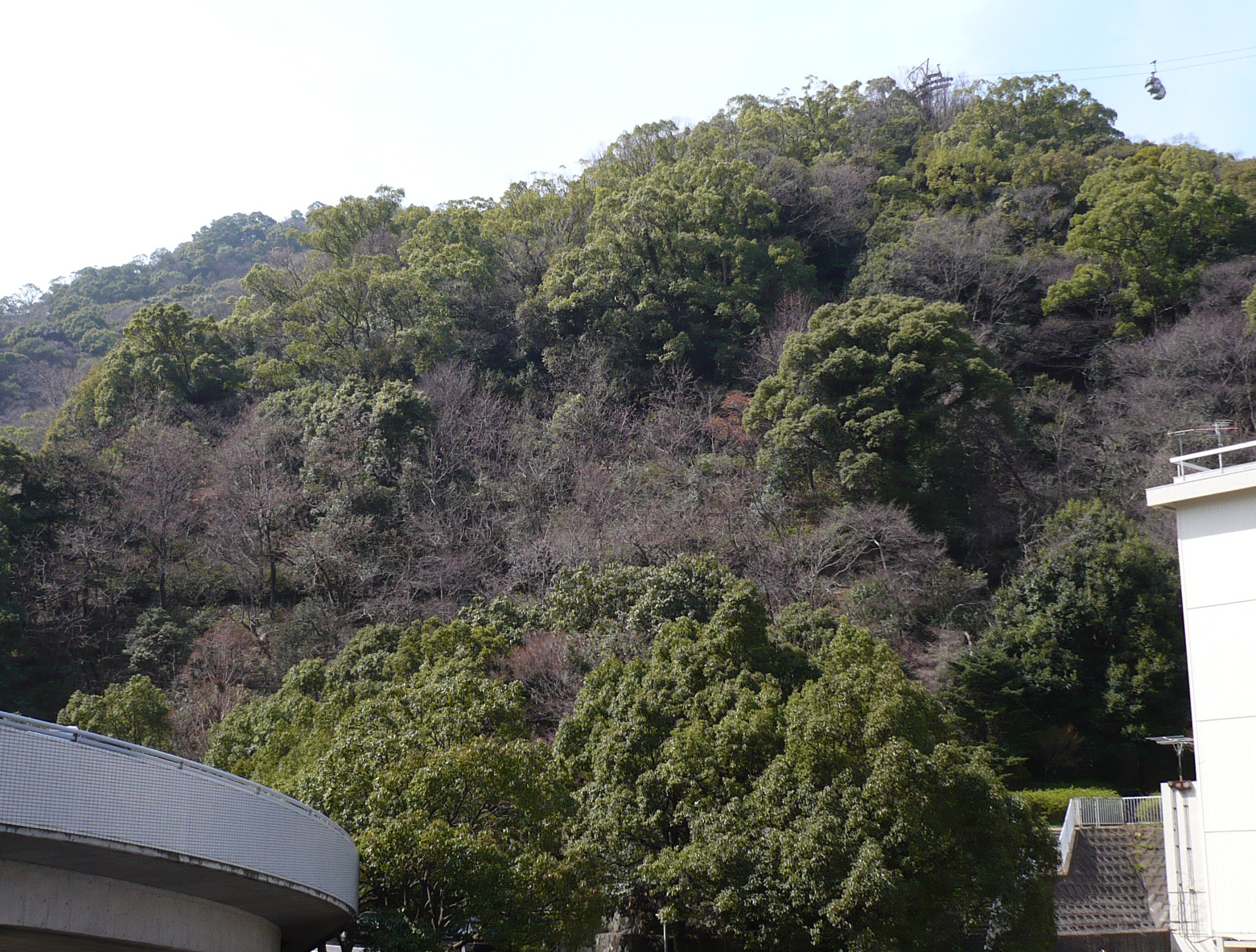 城山